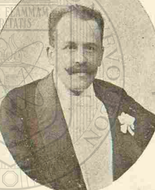 Fotografía de don Rafael Delgado impresa en su primer tomo de Obras Completas